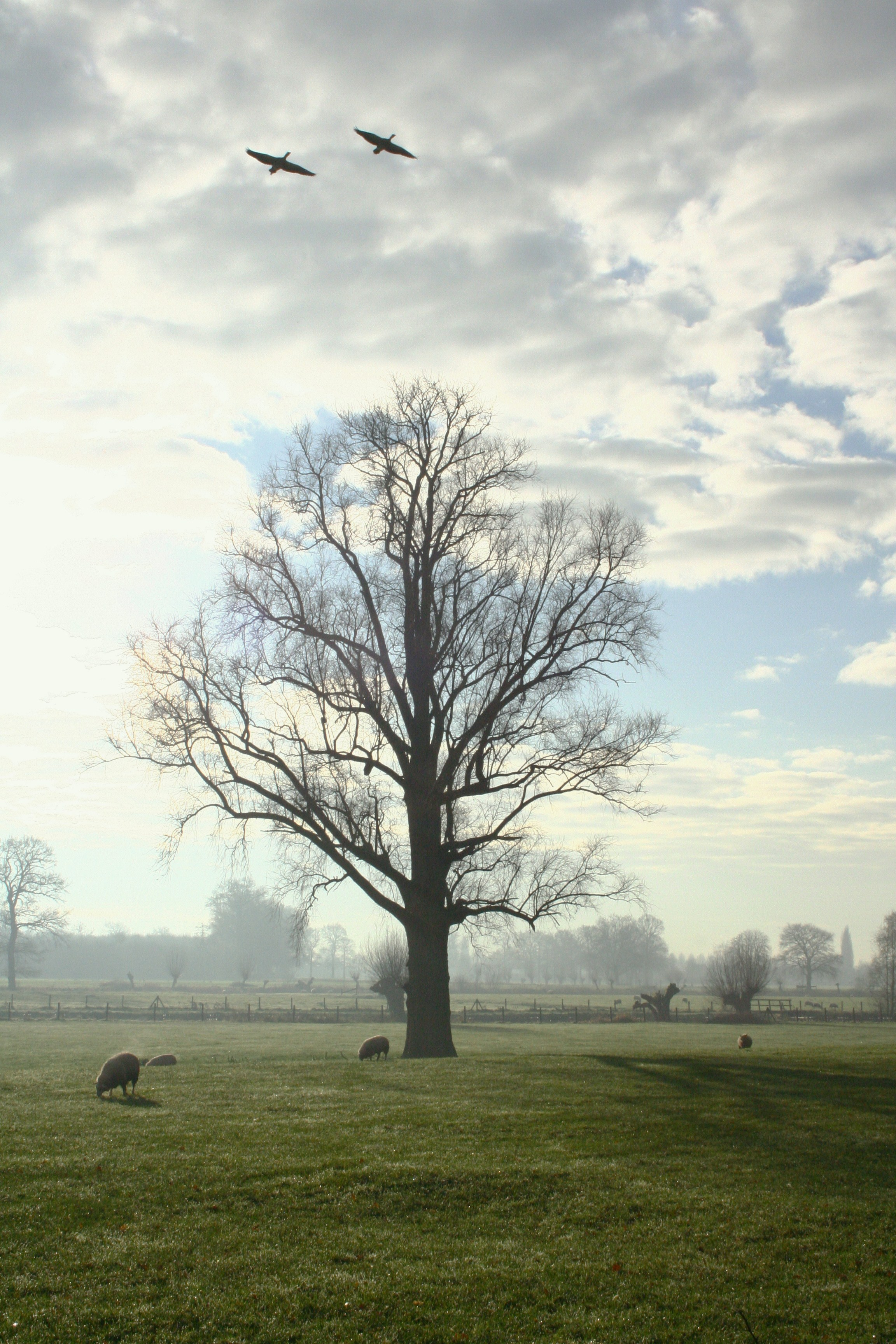 Uitzicht vanaf het fietspad nabij het fazantenpad; Bunnik